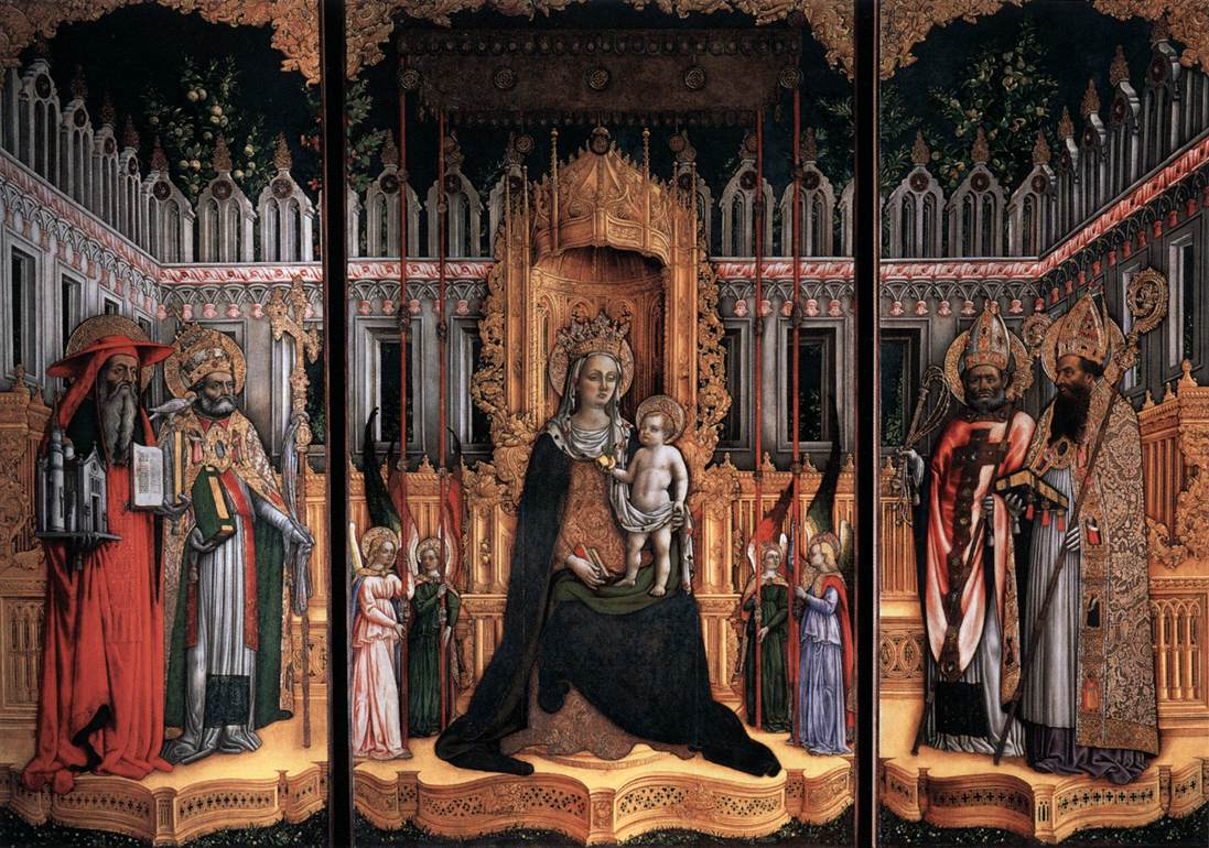 Triptyque de la Gallerie dell'Academia de Venise